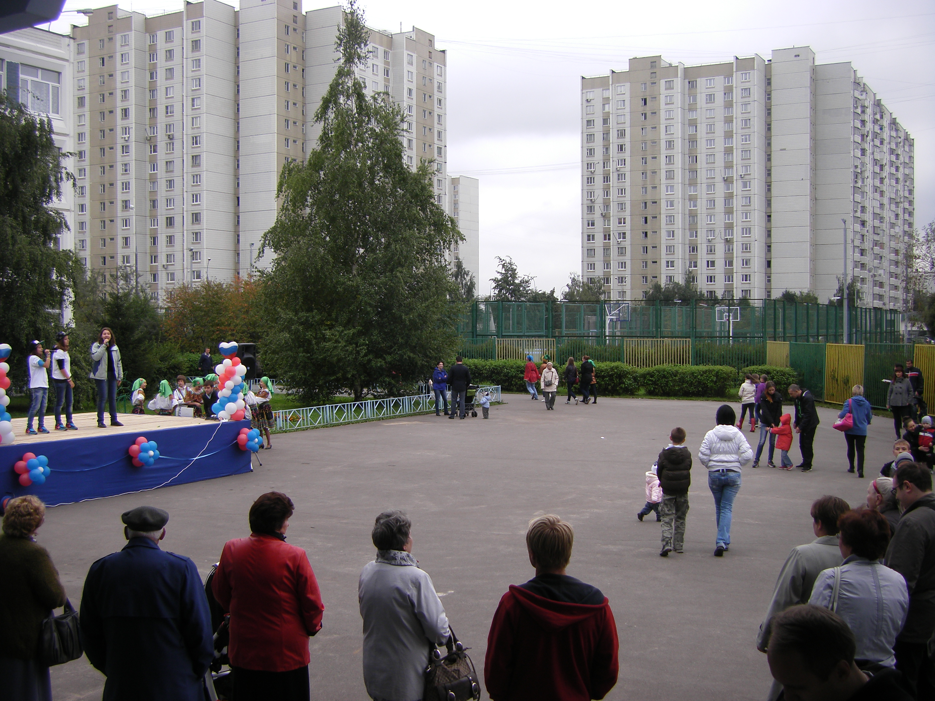 Праздничное представление у школы 1929 в Москве в честь выборов мэра Москвы и дня города